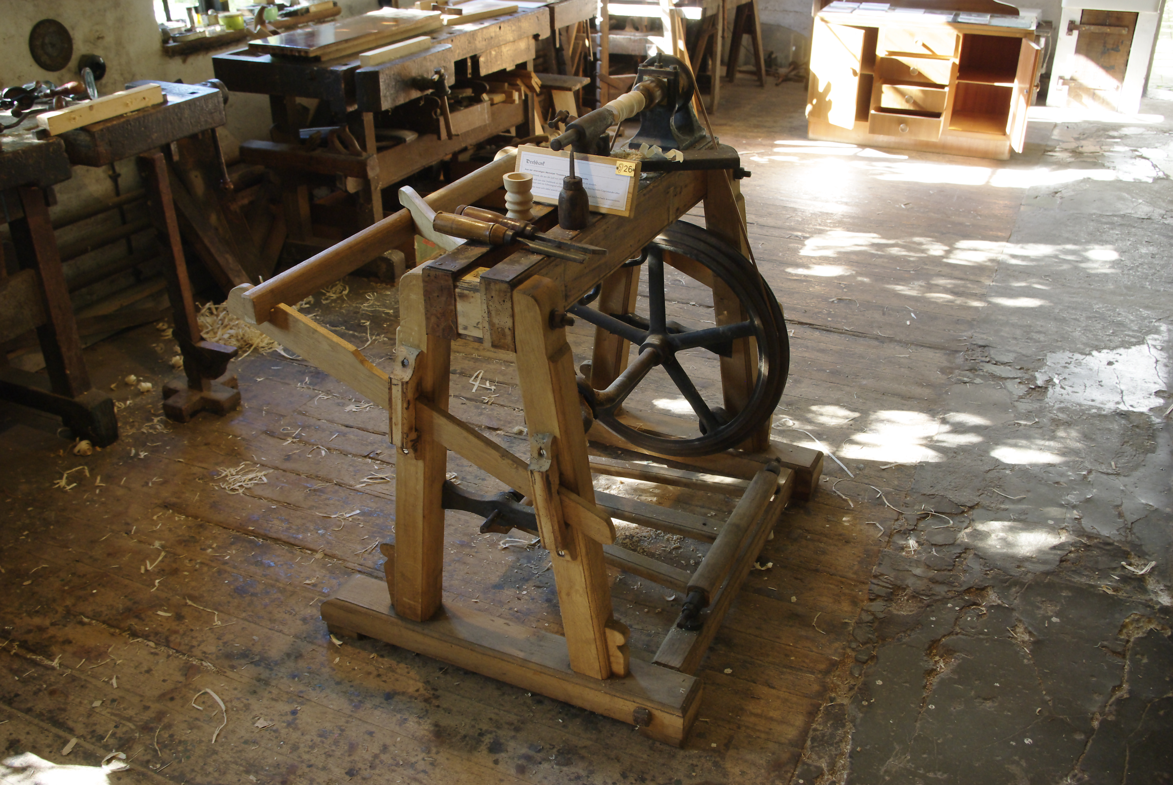 Kulturdenkmale in Friedrichstadt Nummer 60